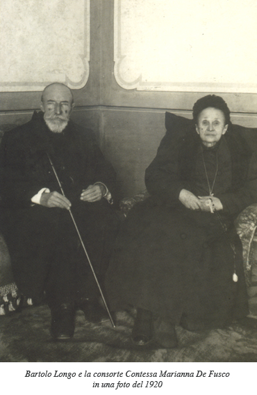 Bartolo Longo e la consorte Contessa Marianna Farnararo De Fusco, in una foto del 1920